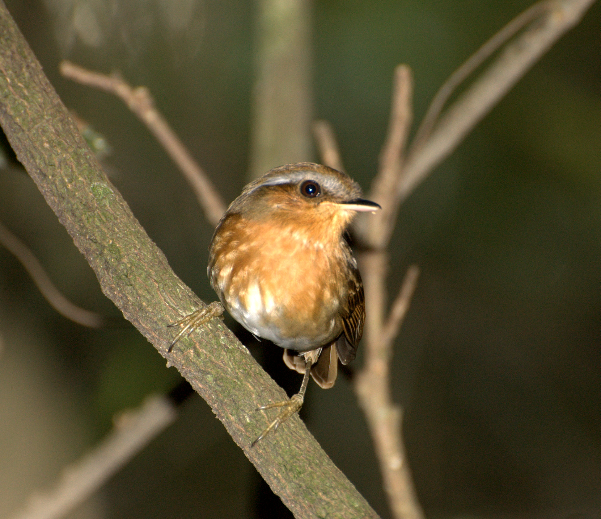 Rufous Gnateater (Conopophaga lineata) Parque Estadual da Serra da Cantareira - São Paulo-SP